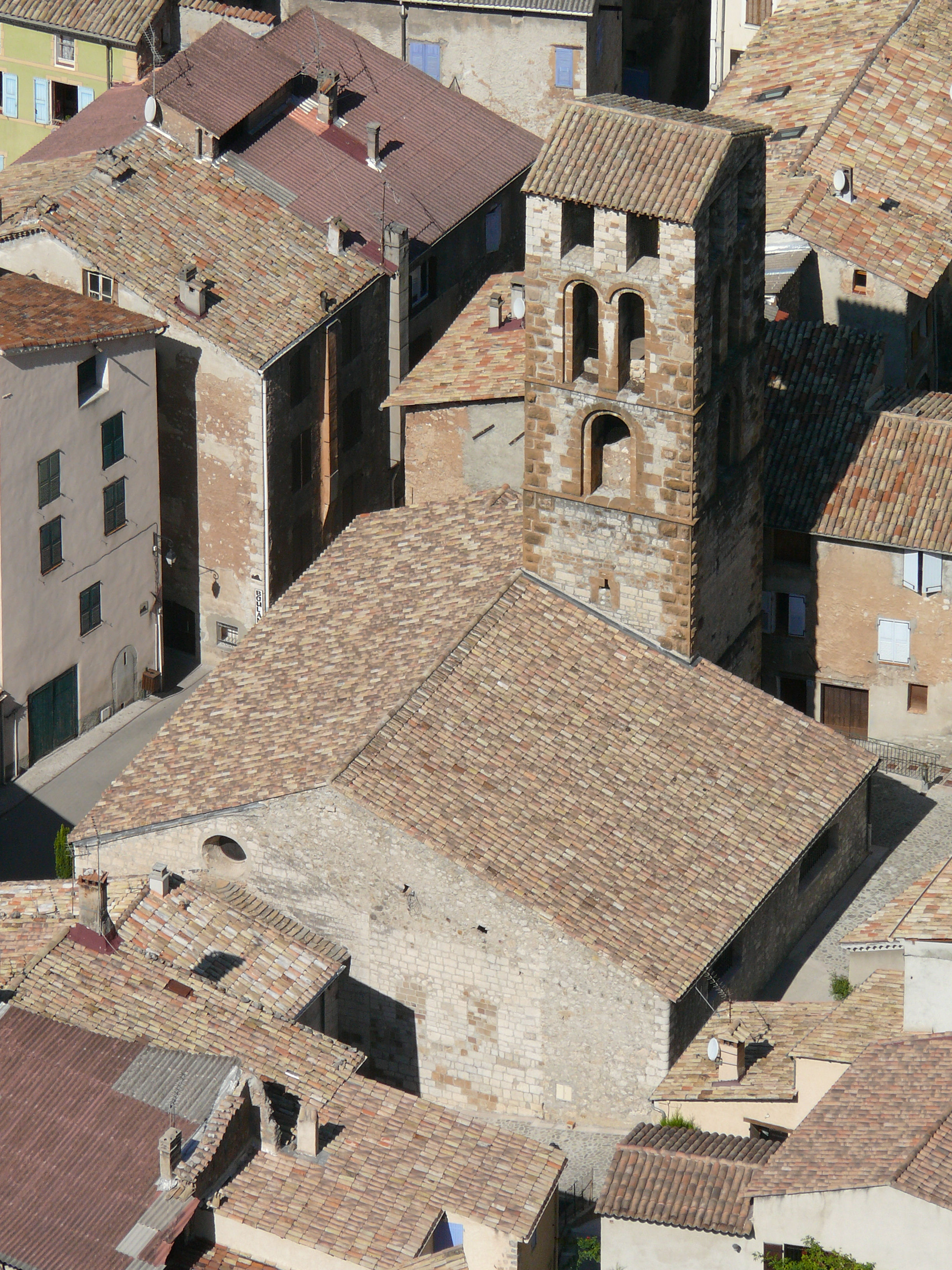 Église Saint-Victor de Castellane